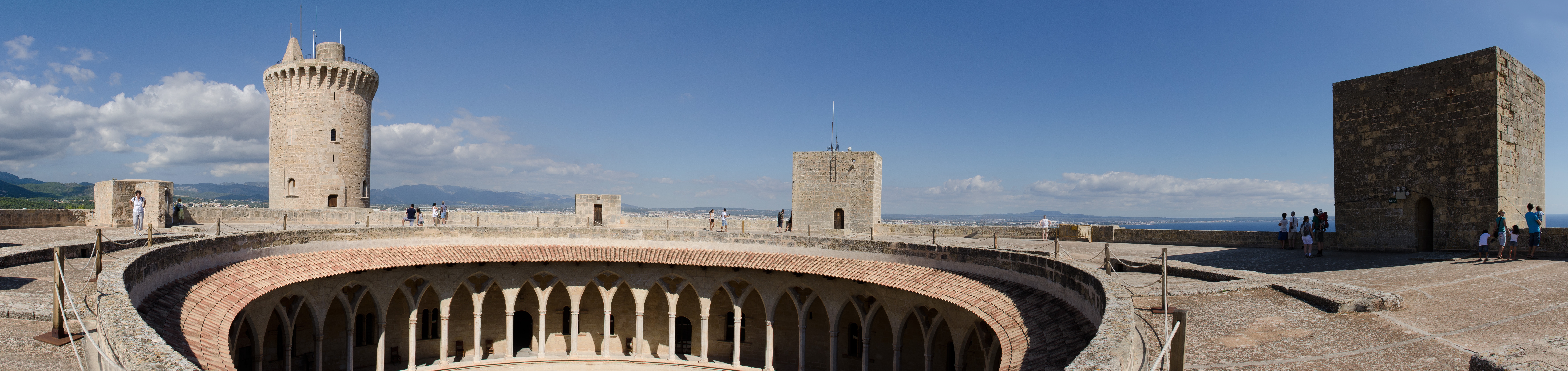 Castell de Bellver, Palma de Mallorca